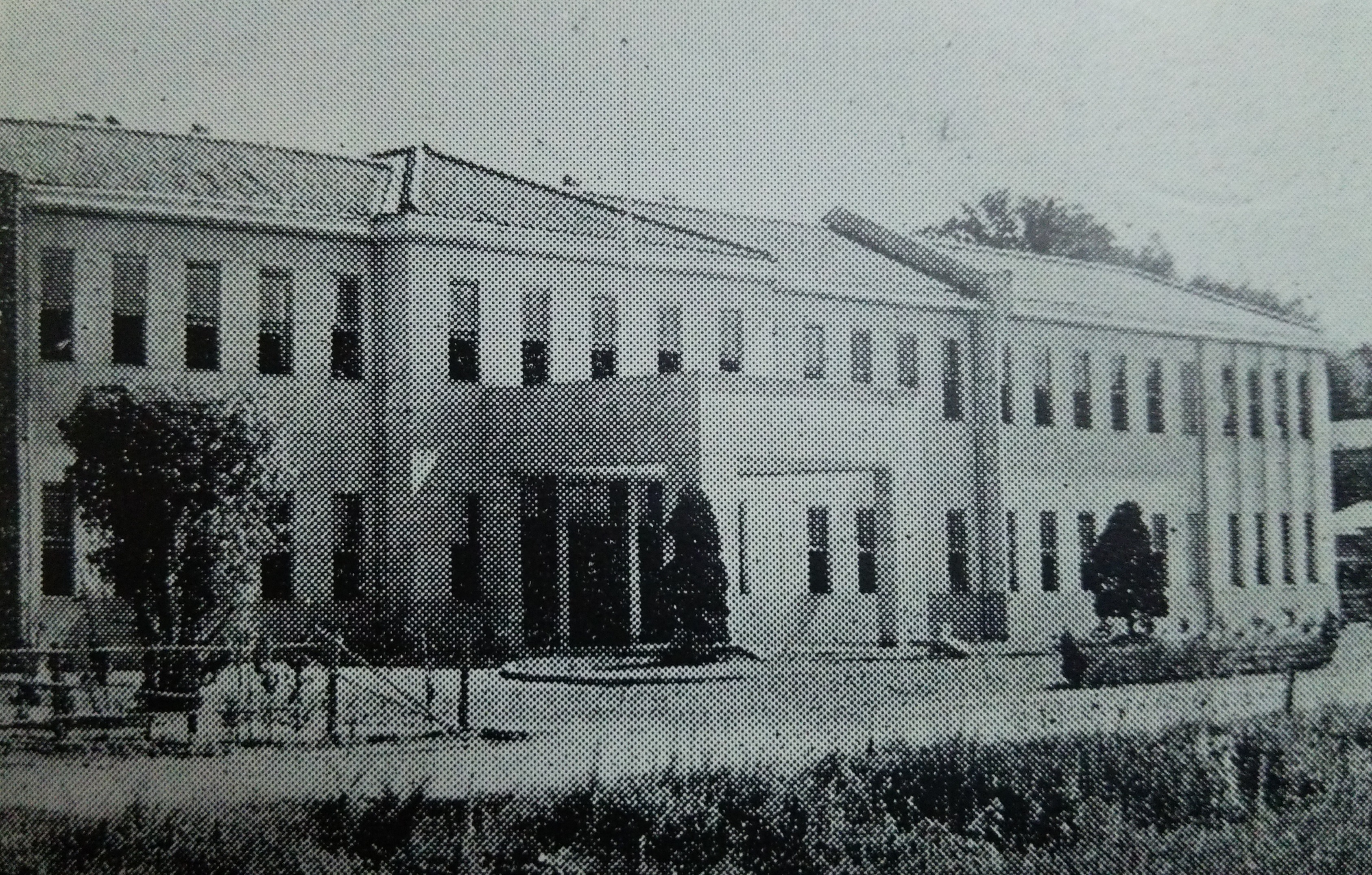 山口地方裁判所岩国支部（1956年以前）